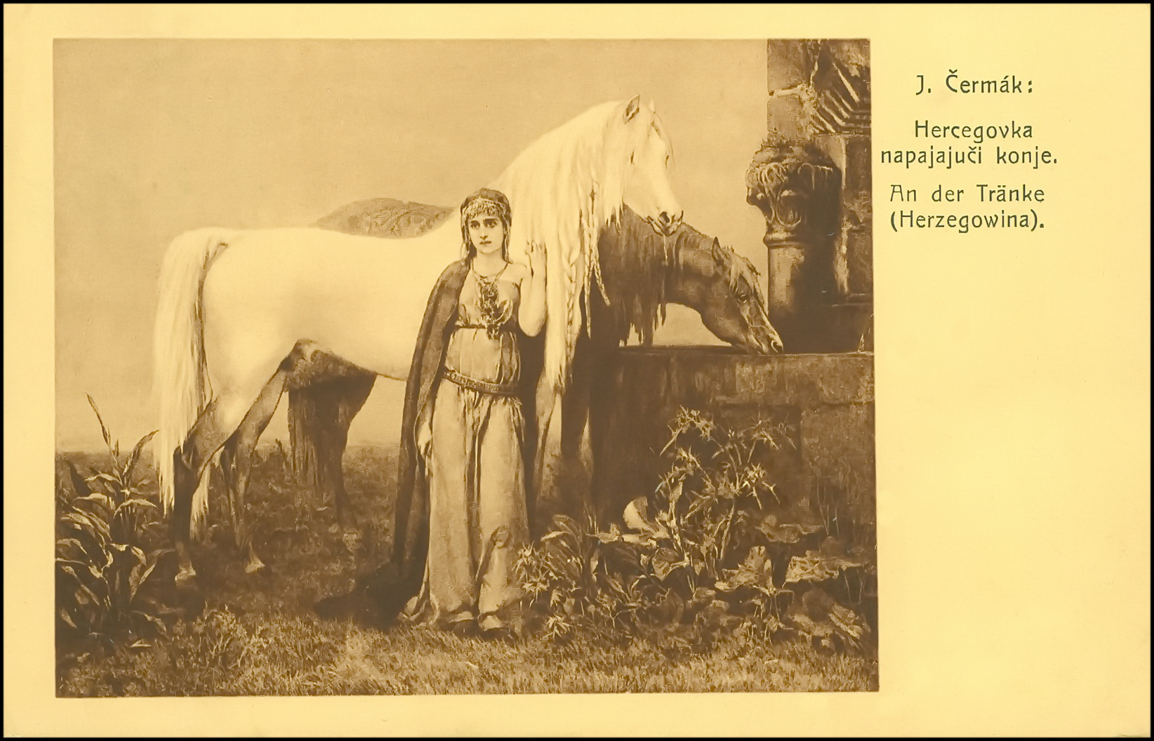 Jaroslav Čermák; Hercegovka napajajući konje. An der Tränke (Herzegovina) u Požegi 24.XII.1911.